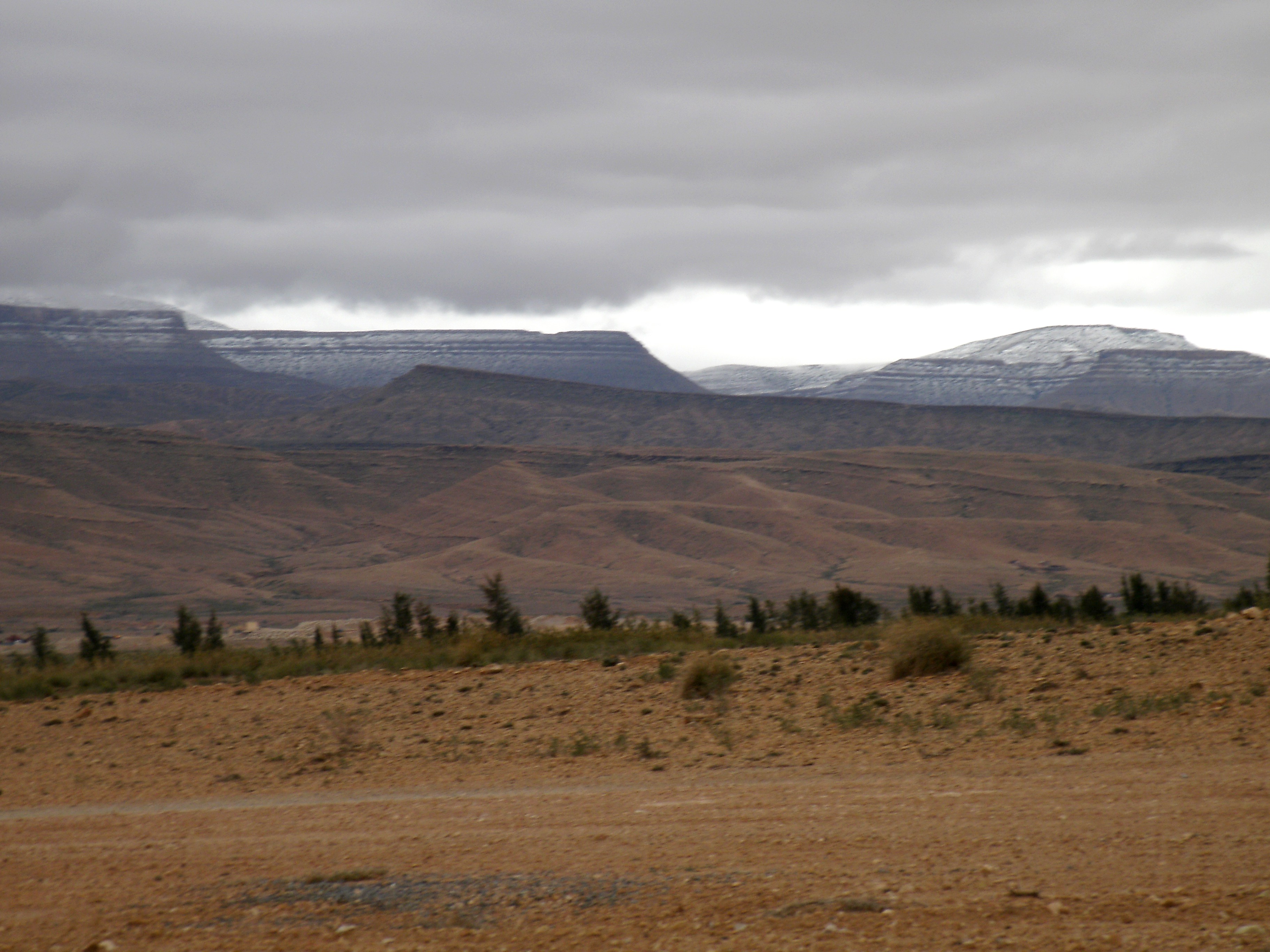 Près de Bou Saâda djebel Selat enneigé